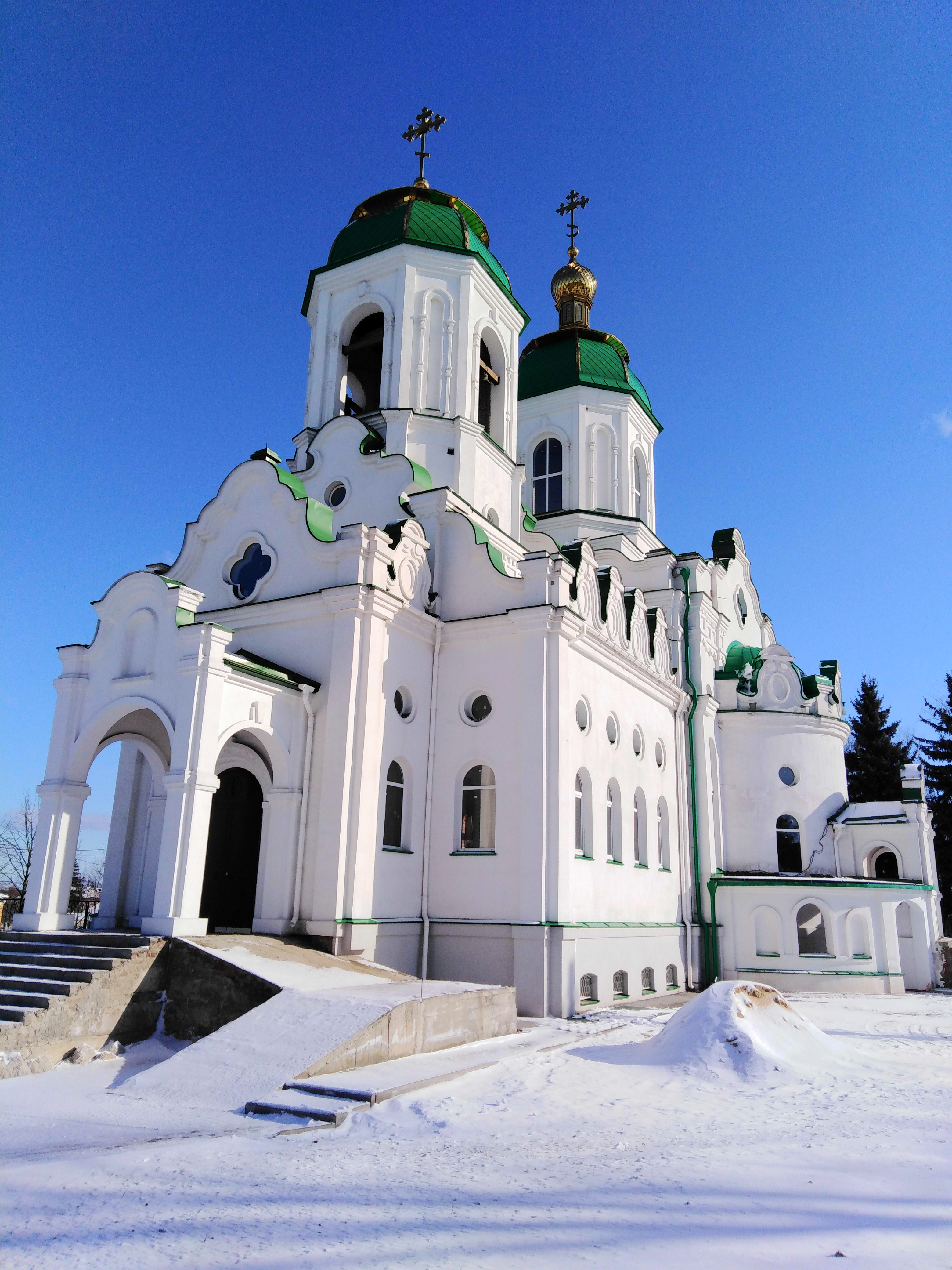 Україна, м. Зміїв. Храм святої Трійці. 2020.